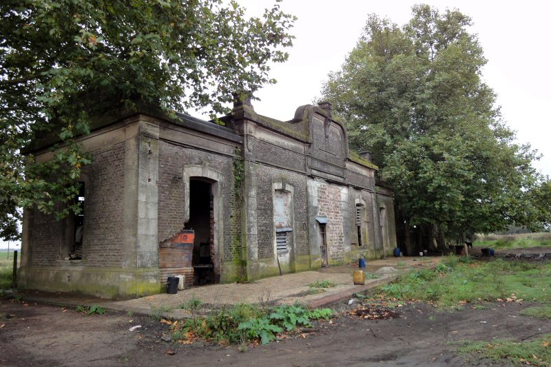 Estación Anasagasti, ex FFCC CGBA, FCGB